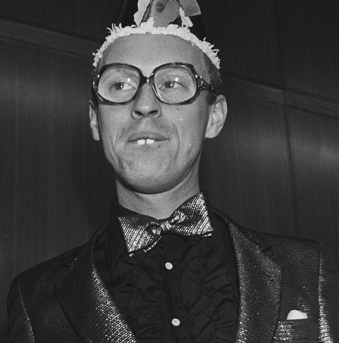 Collectie / Archief : Fotocollectie Anefo Reportage / Serie : [ onbekend ] Beschrijving : Eervolle vermelding voor Theo en Thea bij uitreiking Reiss-microfoon en Nipkowschijf Datum : 29 augustus 1986 Trefwoorden : Uitreikingen Instellingsnaam : Nipkowschijf Fotograaf : Bogaerts, Rob / Anefo Auteursrechthebbende : Nationaal Archief Materiaalsoort : Negatief (zwart/wit) Nummer archiefinventaris : bekijk toegang 2.24.01.05 Bestanddeelnummer : 933-7437